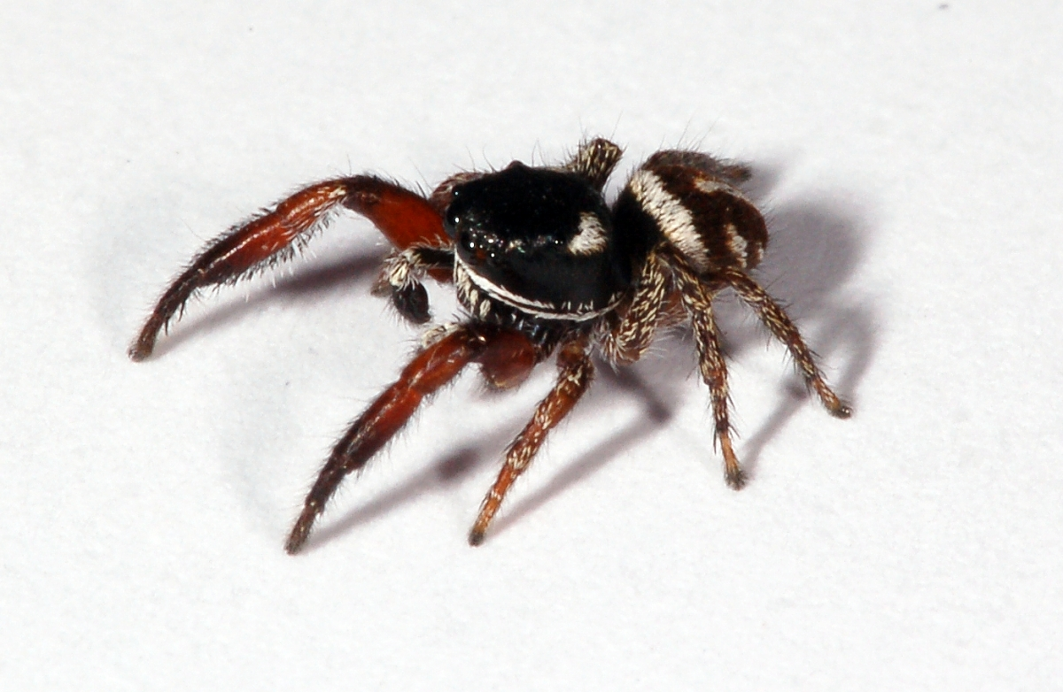 Salticidae, Pellenes nigrociliatus, Eberstädter Düne, Darmstadt, Hessen, Deutschland